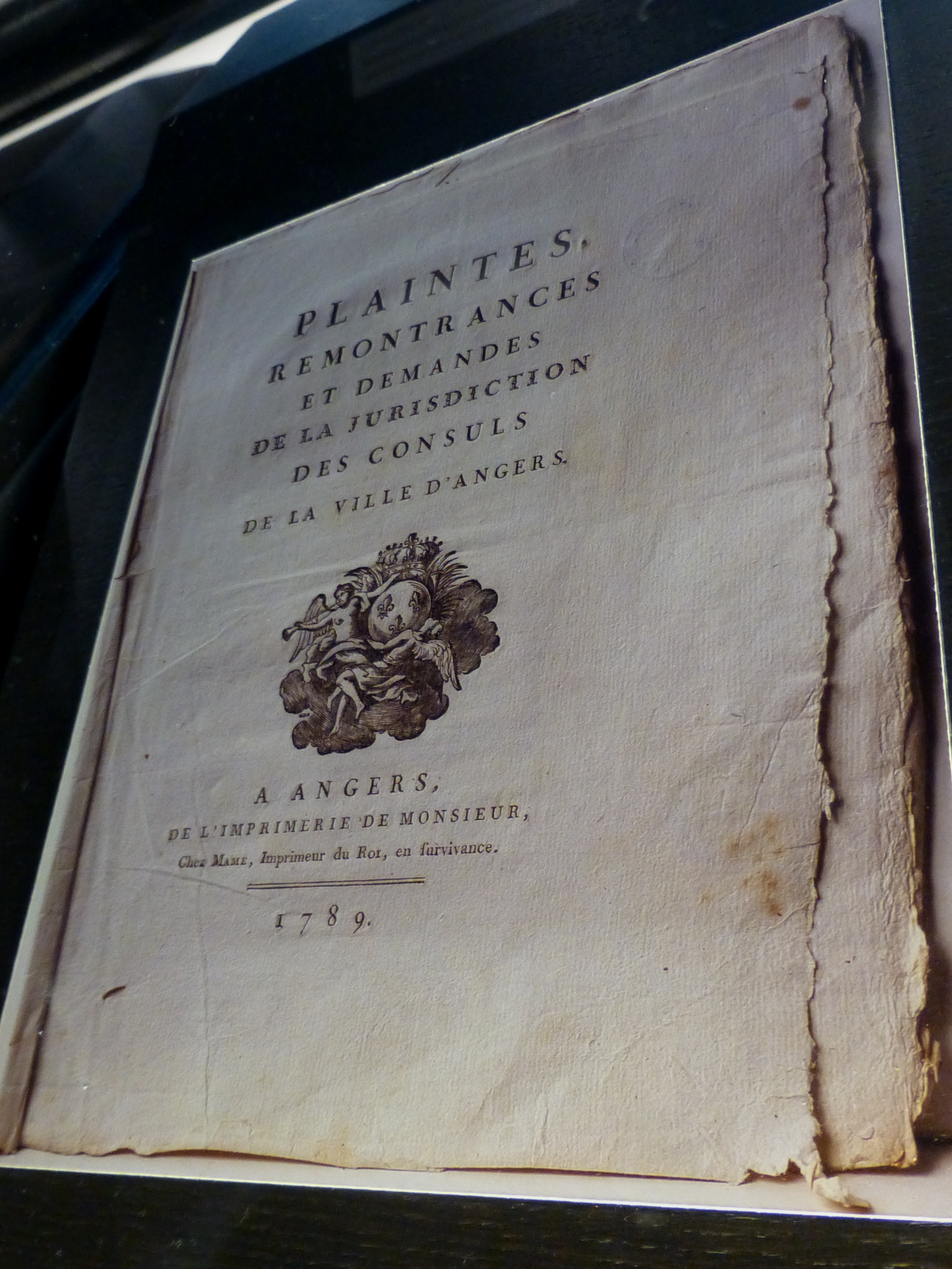 Angers, Cahier de doléances, 1789, Musée des Beaux-Arts